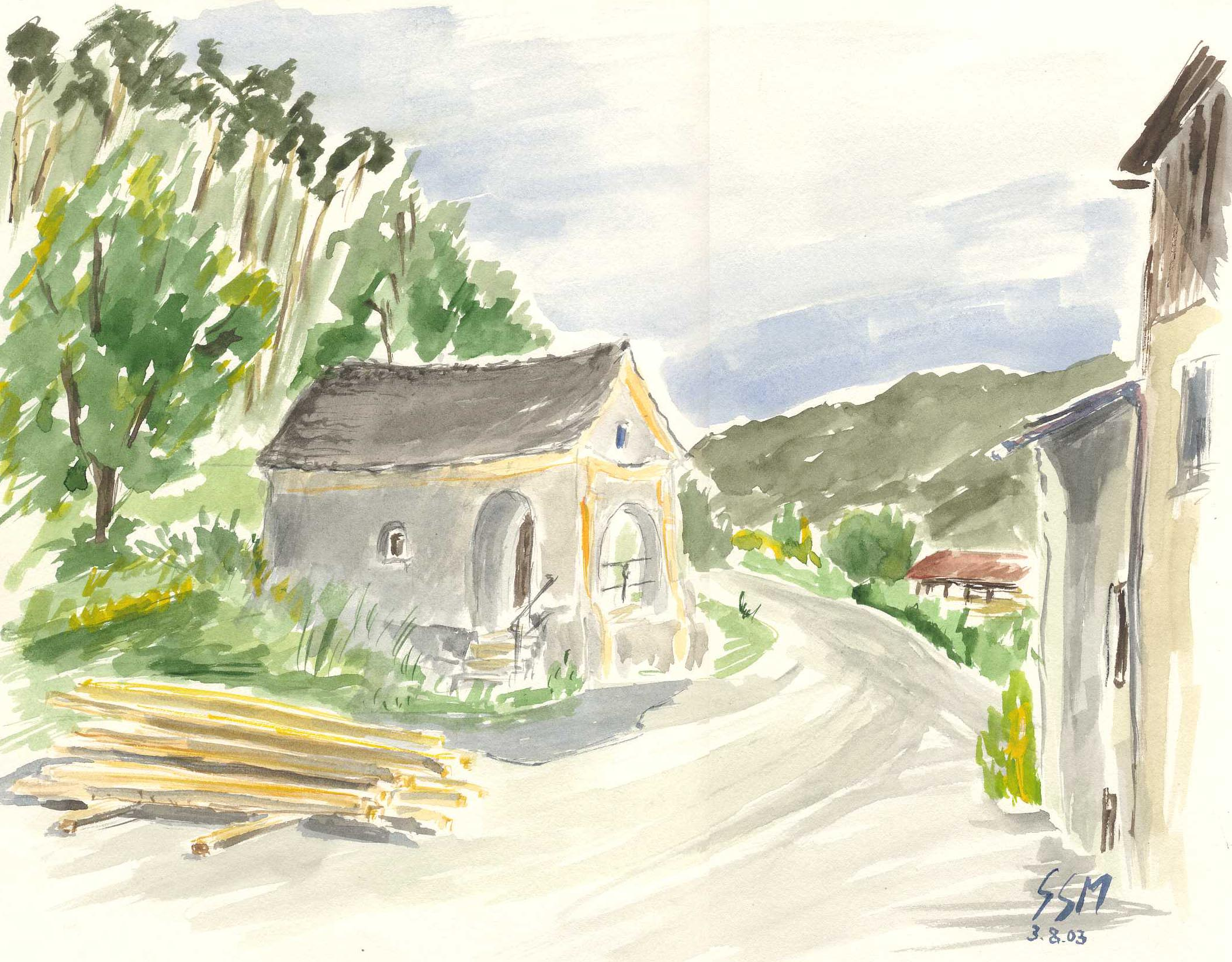 Ablaßmühle Gemeinde Titting im Landkreis Eichstätt2.jpg